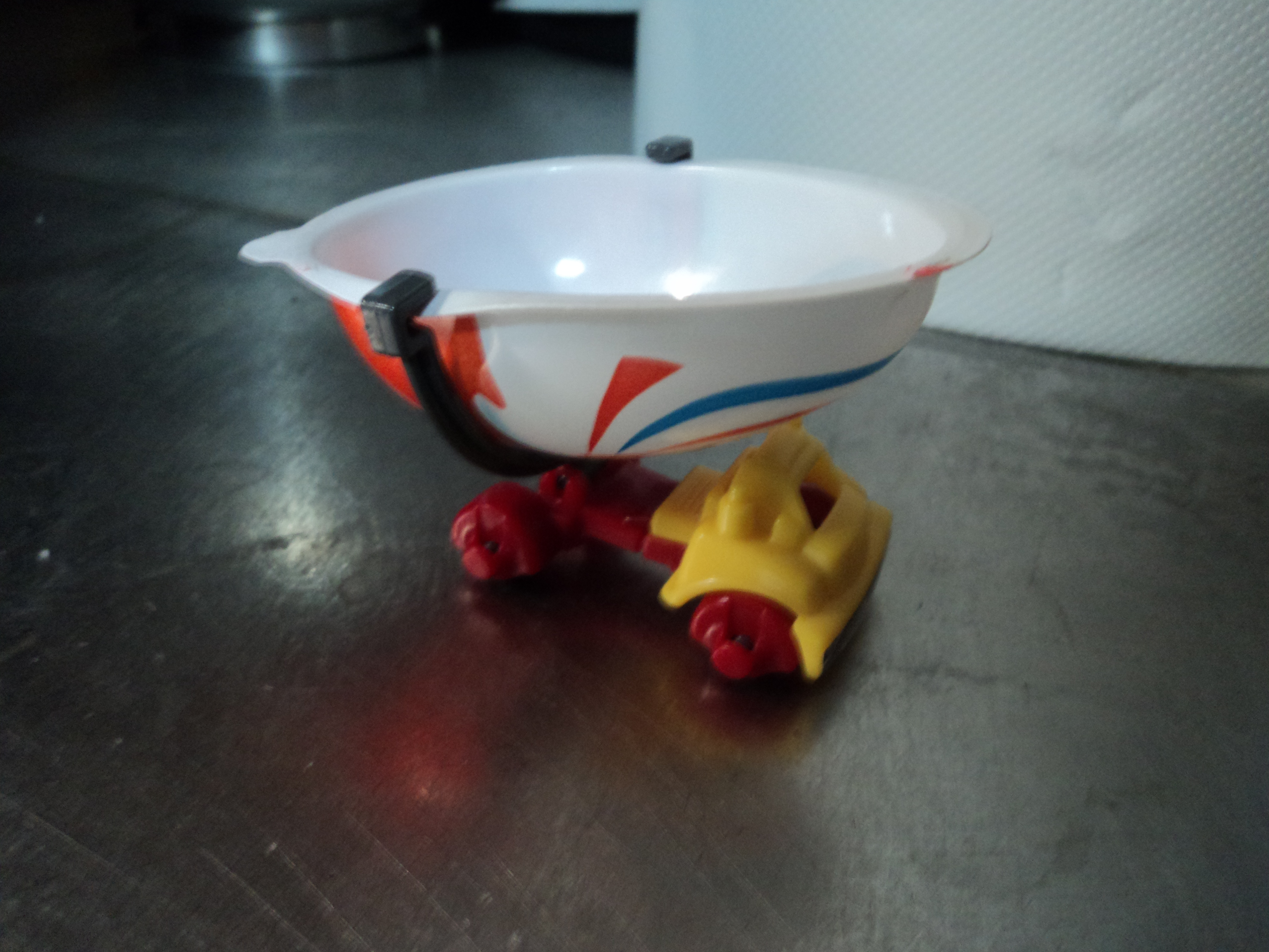 Kinder Sorpresa